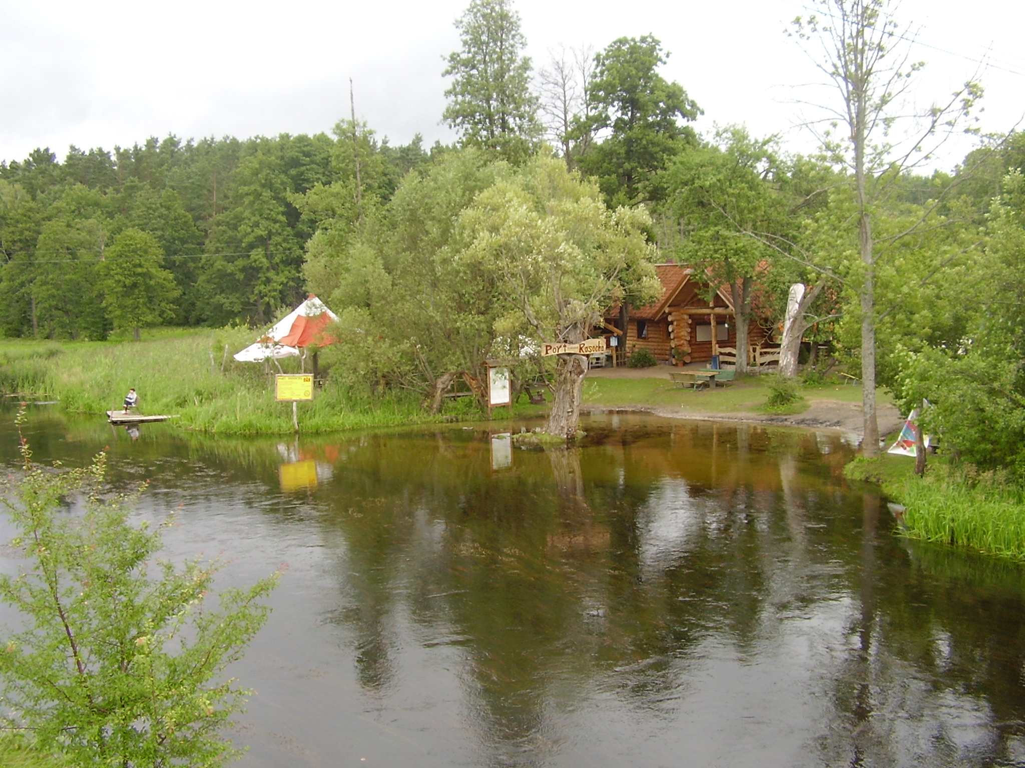 Port Rosocha sierpień 2012